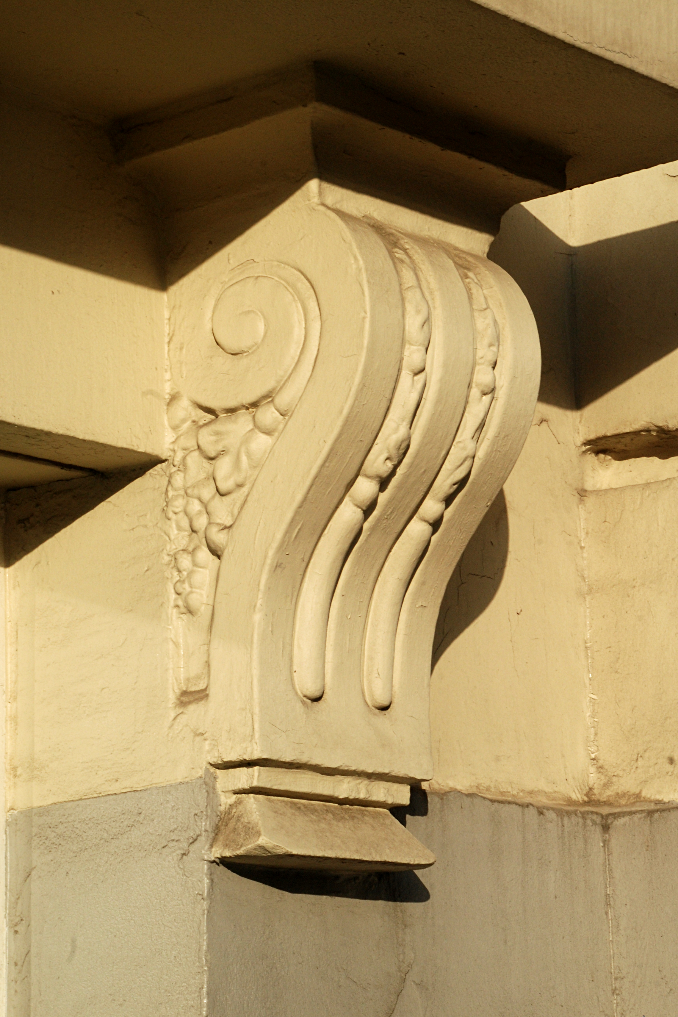 Belgique - Bruxelles - Place Royale - Hôtel du Lotto